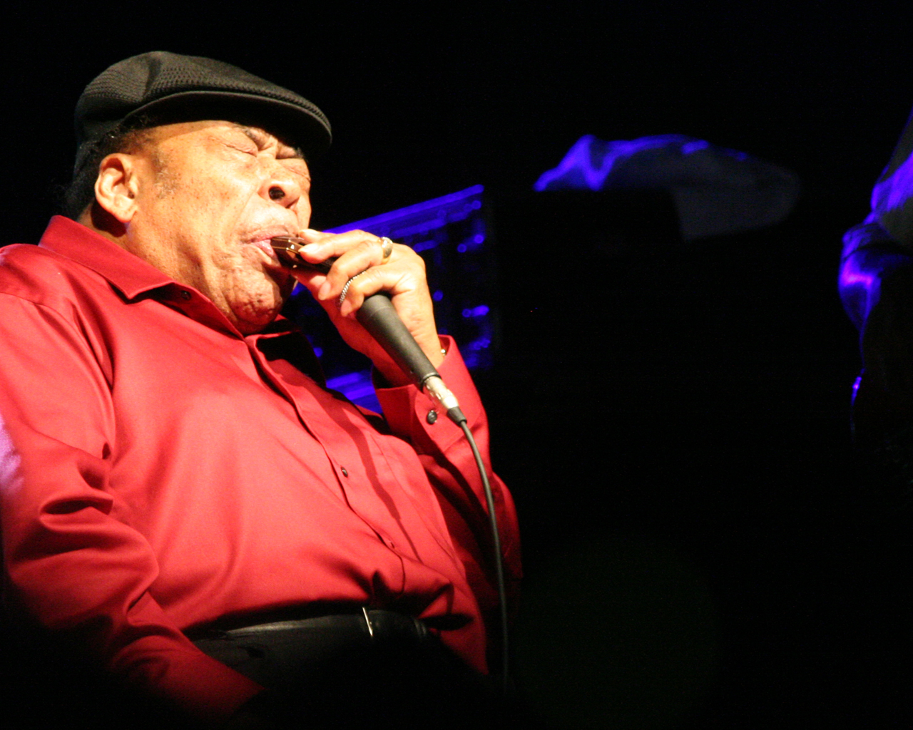 James Cooton en el Hondarribia Blues Festival el 19 de Julio de 2008